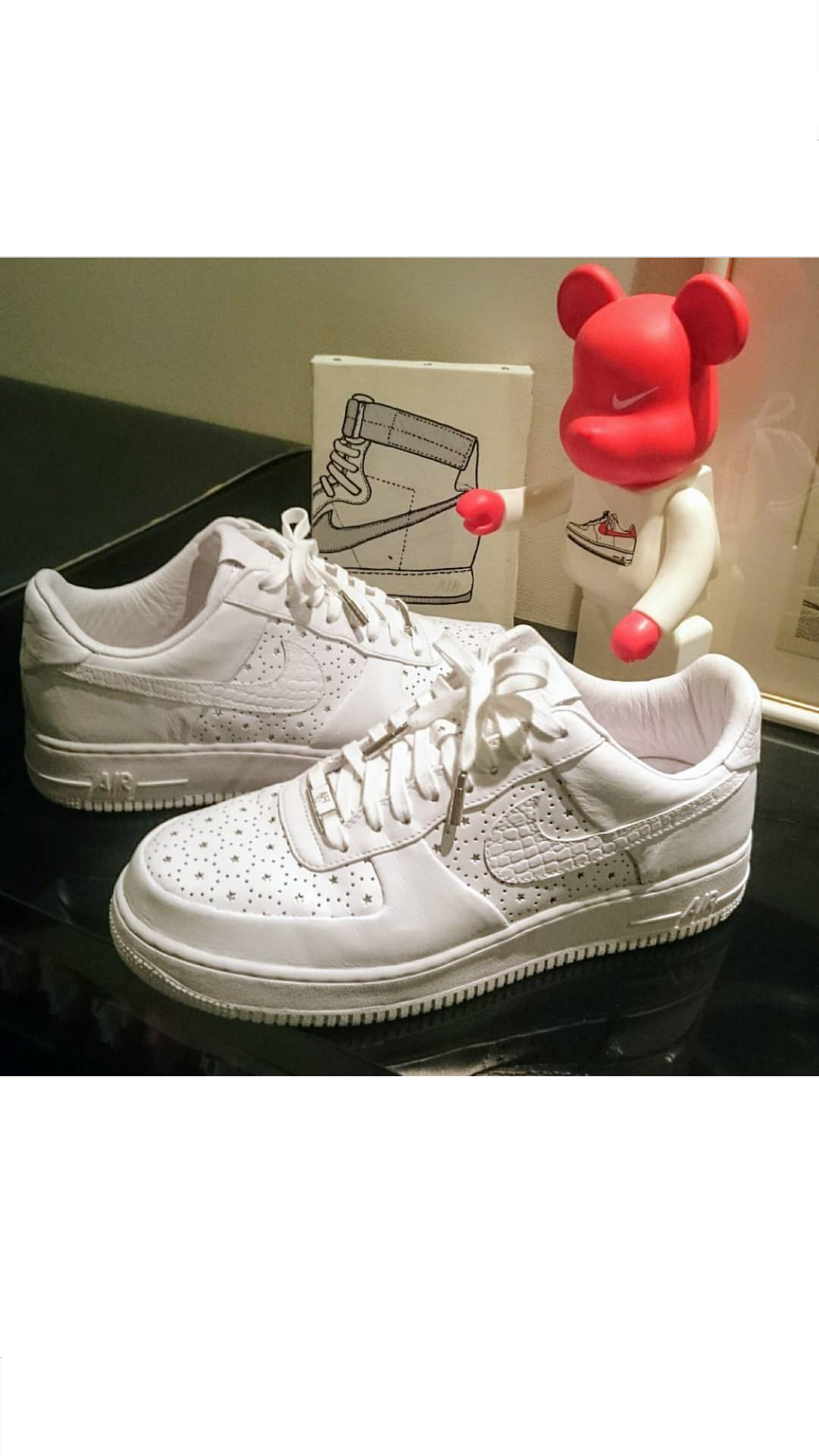 ナイキ エア・フォース1